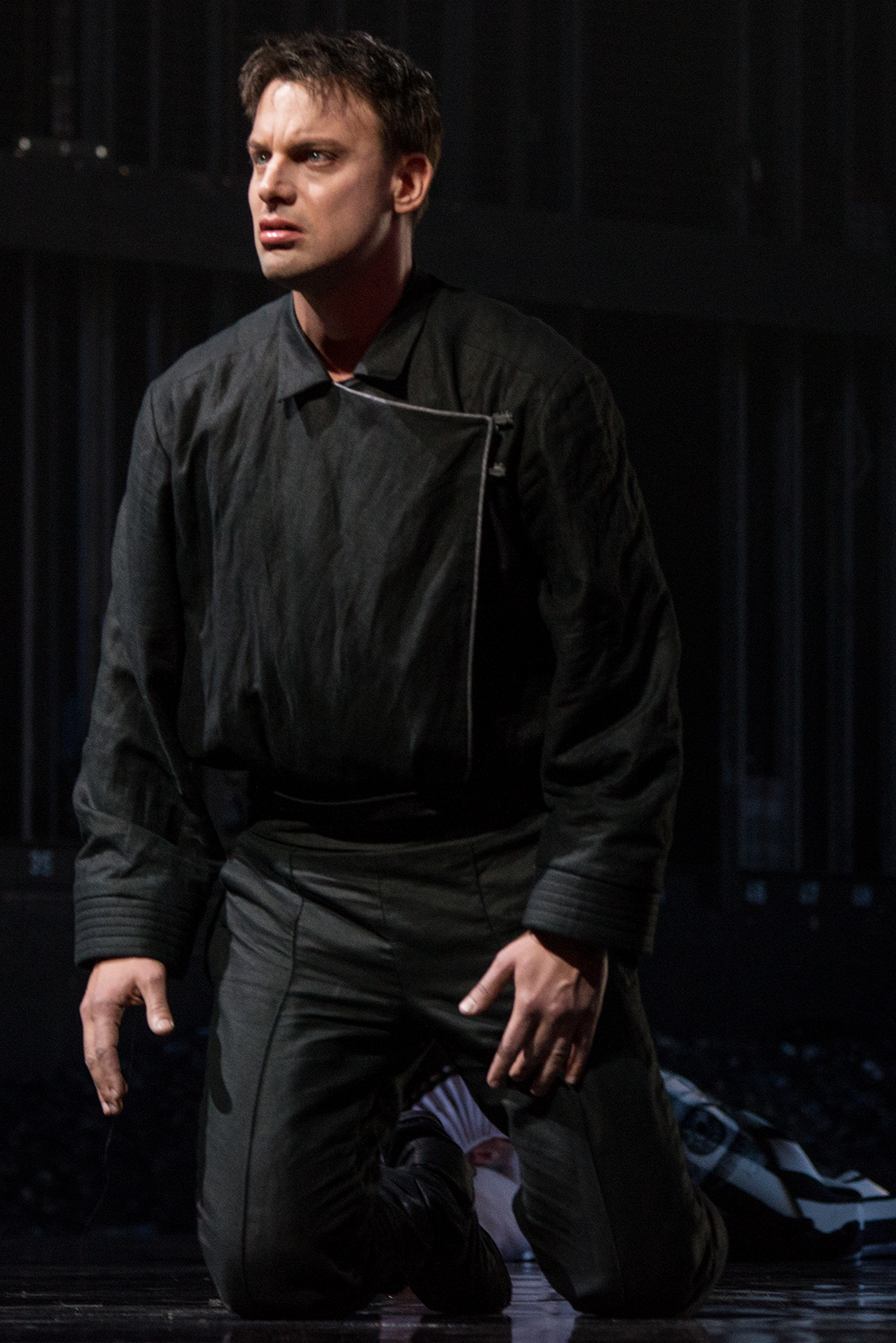 Hamlet von Franco Faccio